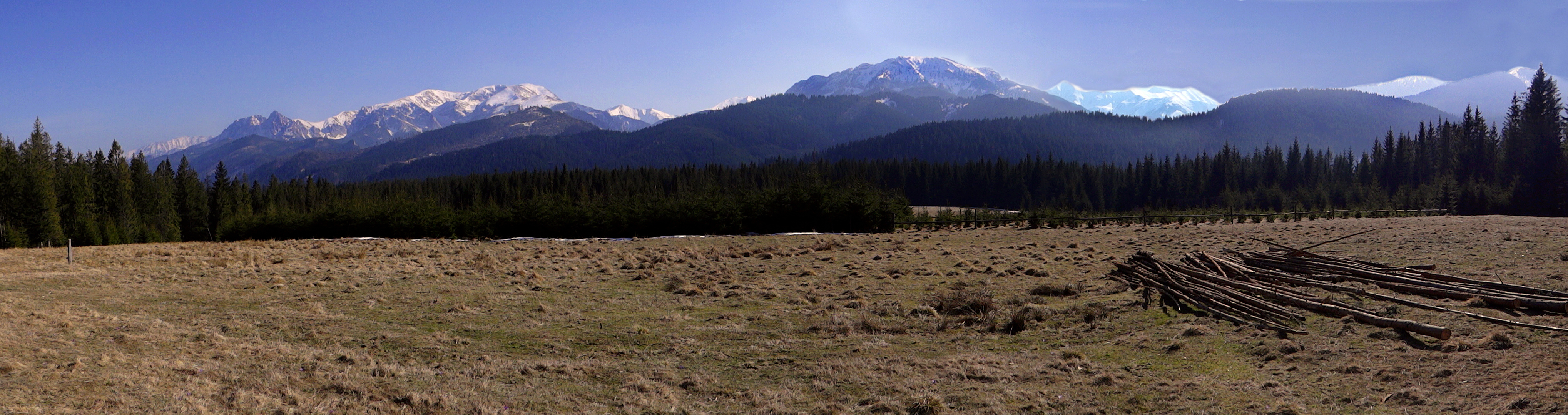 Polana Cicha na Przysłopie Witowskim, panorama